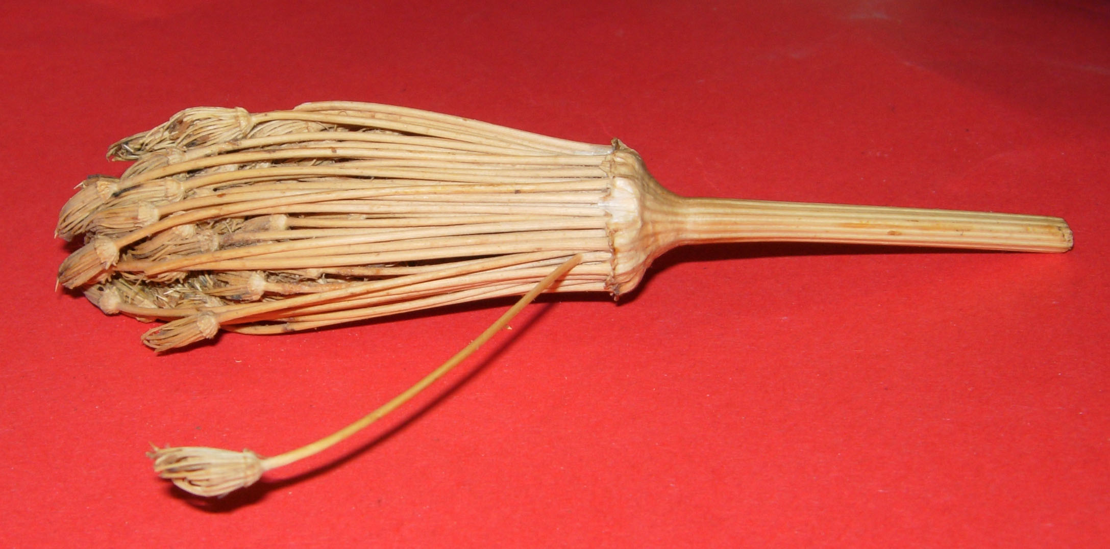 Ombelle de l'herbe aux cure-dents sèchée. Ammi visnaga est considérée comme une mauvaise herbe typiquement ibérico-marocaine. Cette ombellifère méditerranéenne est appelée « herbe aux cure dents ».